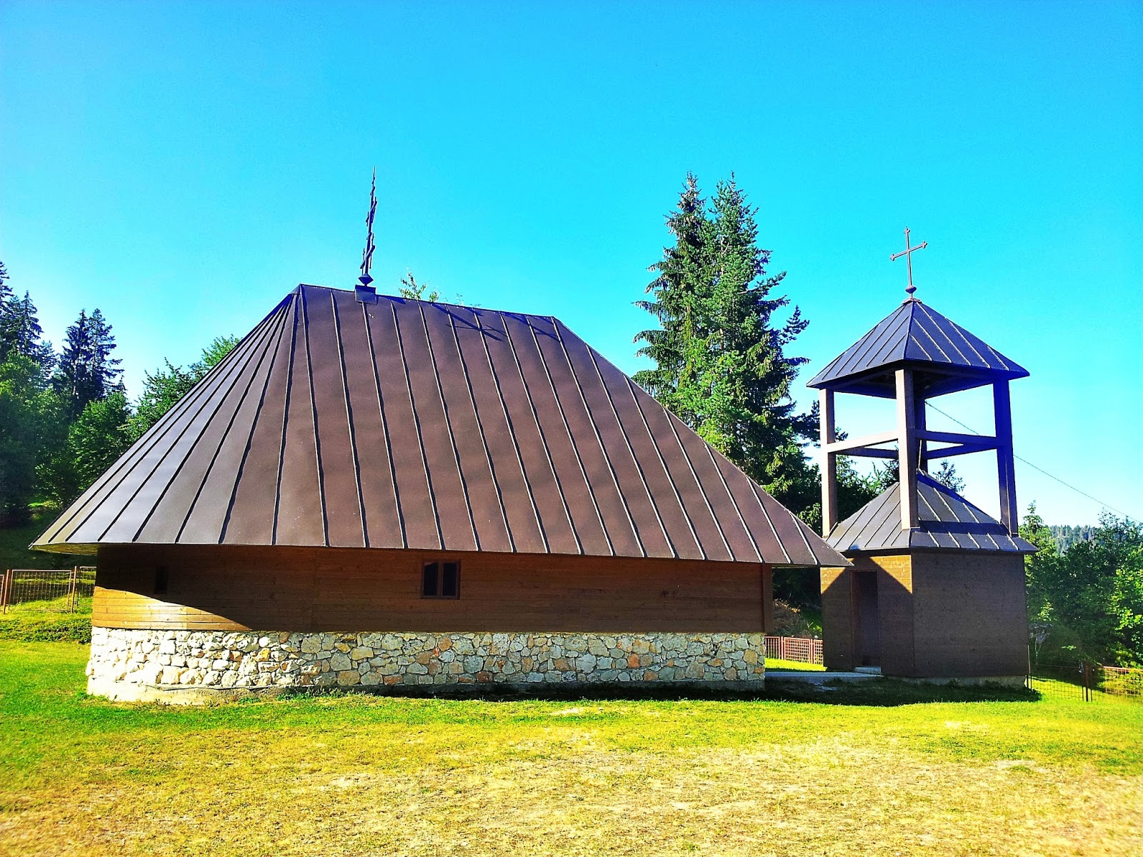 Crkva Svetog Proroka Ilije je izgrađena u selu Luke, na Trebeviću, tačno 1500 metara od novog magistralnog puta Pale - Tvrdimići - Lukavica. Crkva je podignuta 1943. godine, a porušena 1955. godine. Gradnja je ponovo započeta 1993. godine, a hram je osvećen 1996. godine. Osvećenje je izvršio Mitropolit Nikolaj. Saborni dan crkve je nedjelja po Ilindanu. Hram Sv. proroka Ilije na Lukama, pripada paljanskoj parohiji. Hram je podigao komandant Trebevićkog odreda Šćepan Lučić i vojni sveštenik Novak Stanojević, koji je ovaj hram osvetio po blagoslovu mitropolita Dabrobosanskog Nektarija. Odlukom Oblasnog odbora Komunističke partije za grad Sarajevo hram je srušen 1955 Na mjestu gde je bila crkva blagoslovom mitropolita Nikolaja 1993. godine započeta je gradnja crkve brvnare po projektu Predraga Peđe Ristića, arhitekte iz Beograda. Crkva je završena 1996. godine. Osvetio je iste godine 4. avgusta mitropolit Nikolaj. Zasluge za podizanje ove crkve pripadaju svješteniku Miomiru Zekiću i vijernicima trebevićkog kraja. Godine 1999. u porti crkve sagrađena je sala za narod. U hramu se služi 12 puta godišnje, a saborni dan je prva nedjelja po Sv. Iliji.